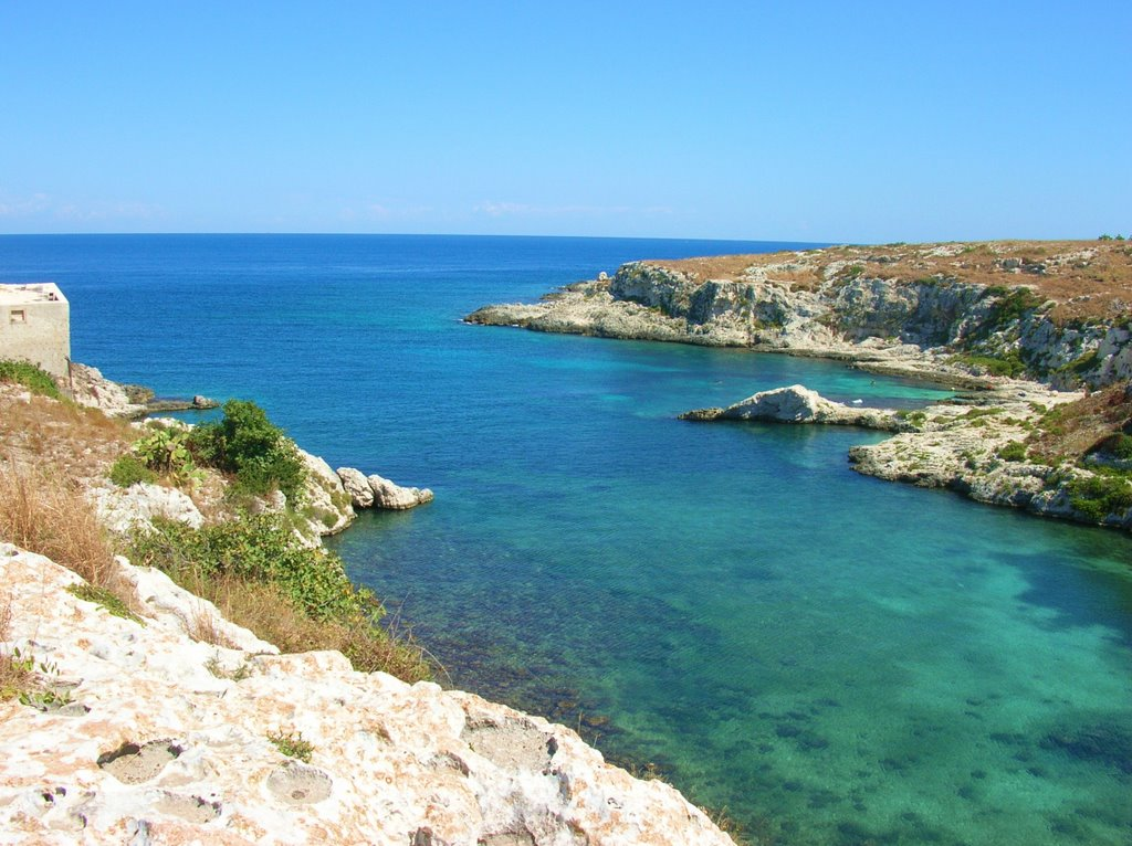 La Baia di Santa Panagia - Siracusa - Sicilia